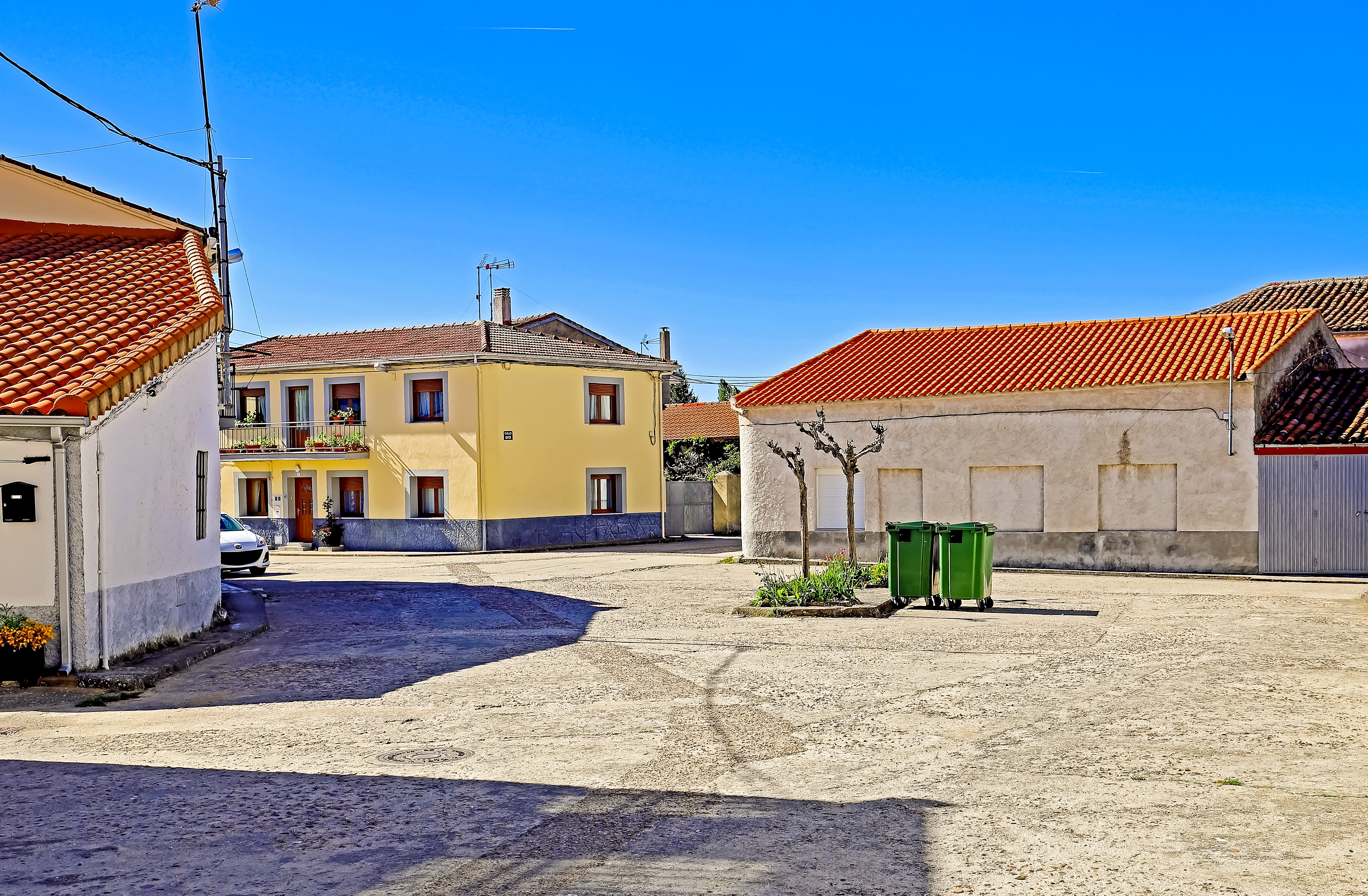 Santo Domingo de Herguijuela es una localidad que pertenece a Herguijuela del Campo, comarca de Entresierras, provincia de Salamanca.